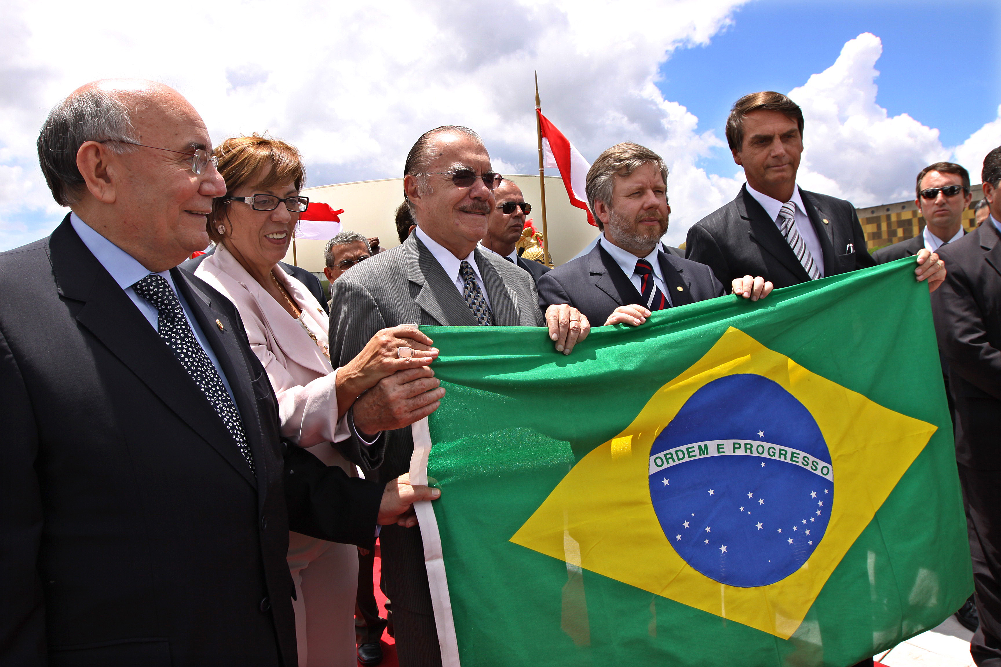 Estudantes dos Projeto Jovem Senador 2009 participam da solenidade de hasteamento da bandeira. Participam: senador Flexa Ribeiro; presidente do Senado, senador José Sarney (PMDB-AP); deputado Jair Bolsonaro (PP-RJ); Foto: Marcos Oliveira/Agência Senado